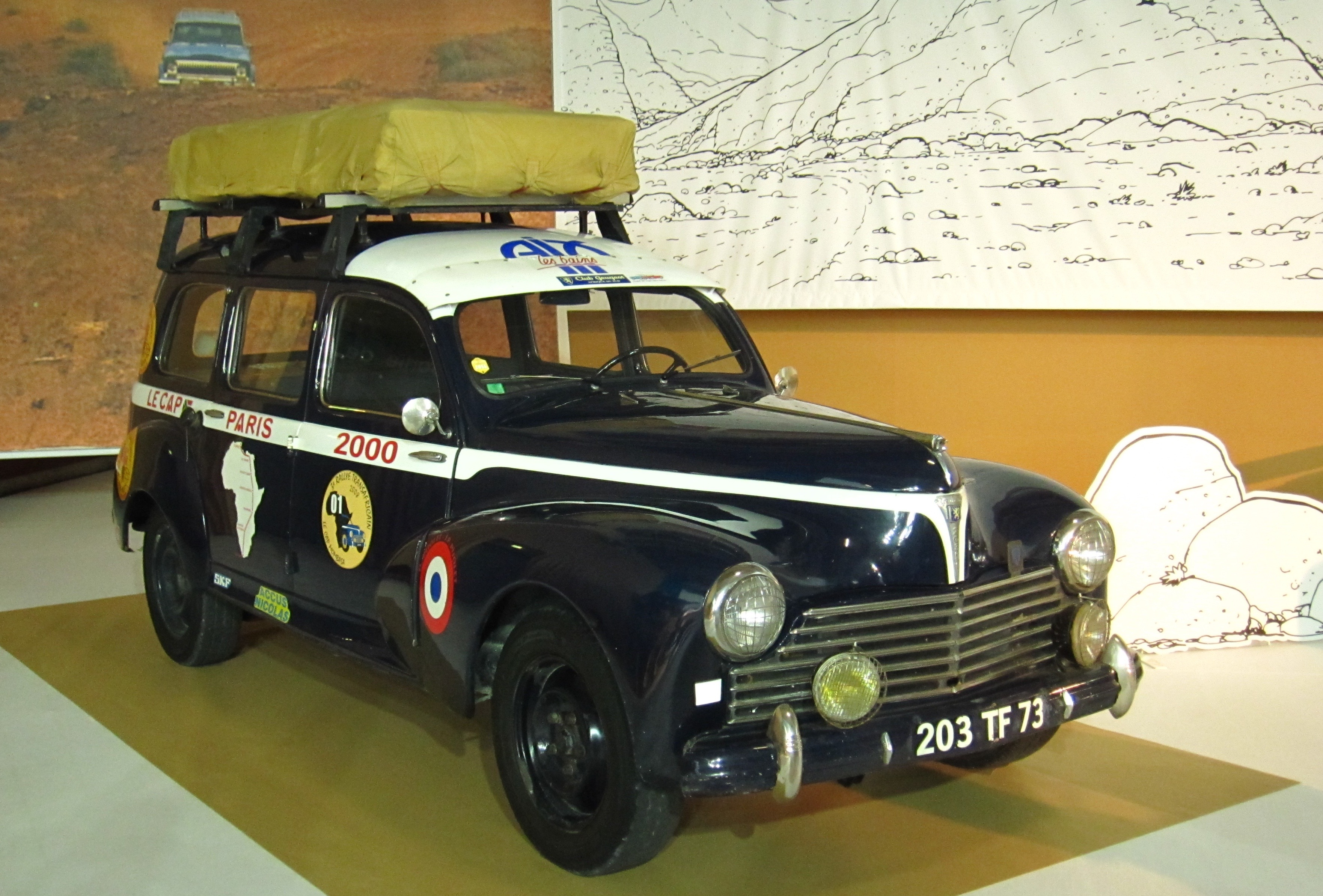 Mondial de l'Auto Paris 2018